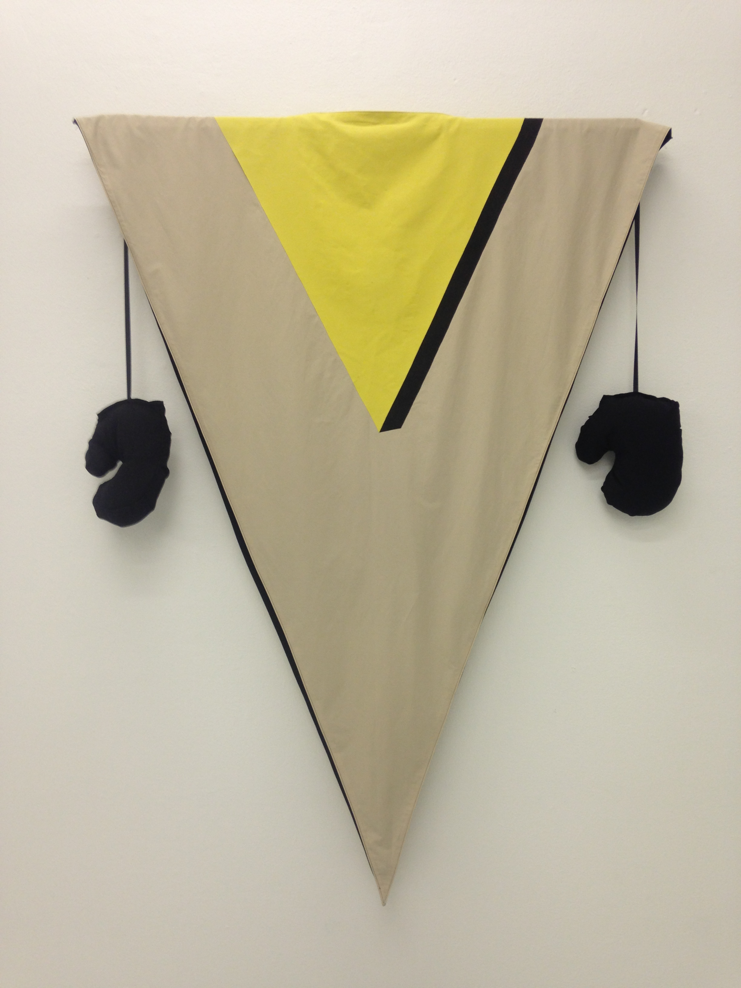 Artwork by Yvette Brackman, The Catalyst, Overgaden Institut for Samtidskunt, 2014